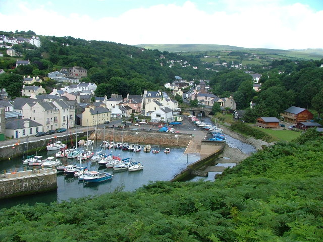 Old Laxey